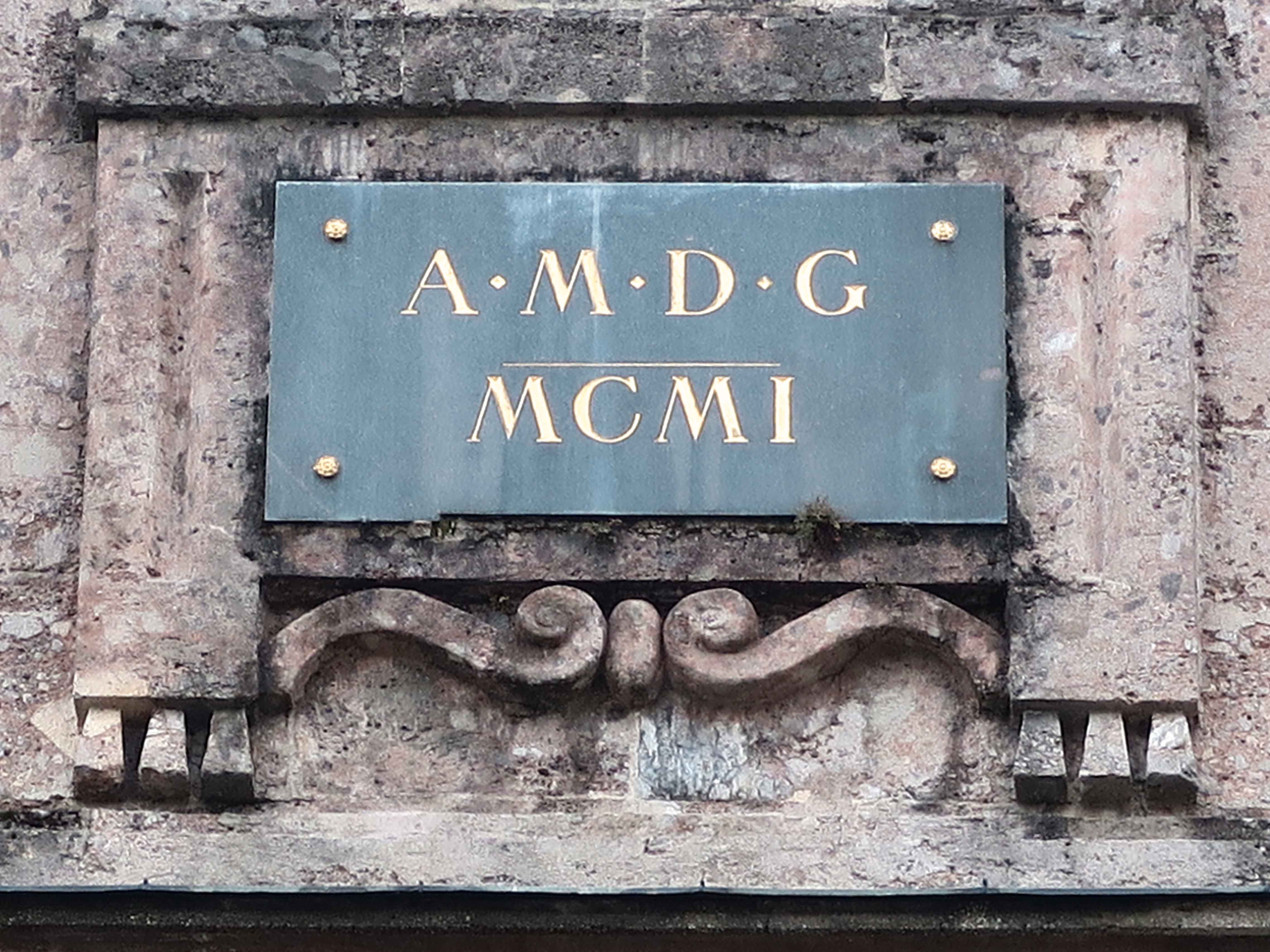 Schild mit Gründungs- bzw. Baudatum der Kirche